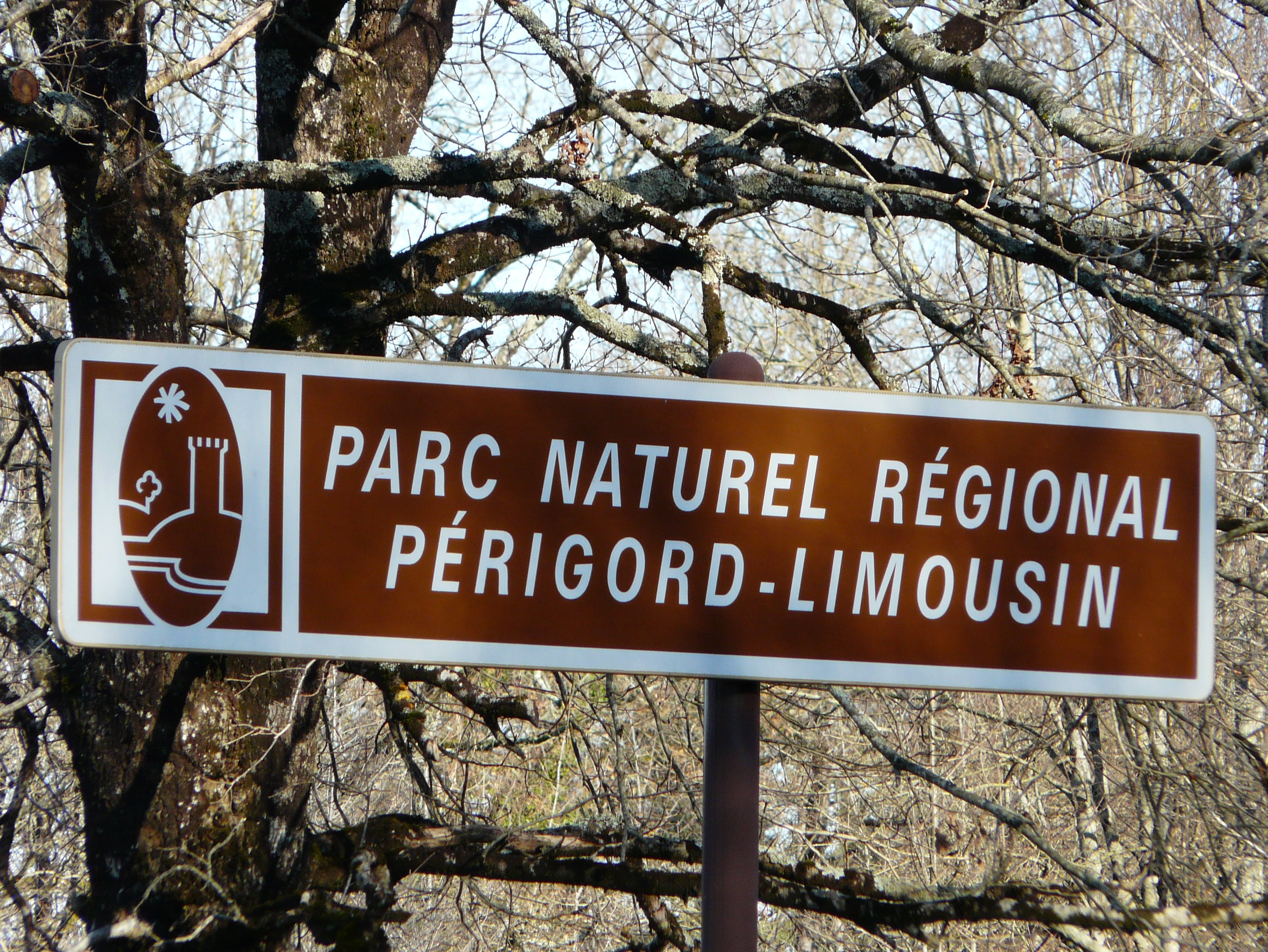 Panneau d'entrée dans le parc naturel régional Périgord-Limousin, Dordogne, France.